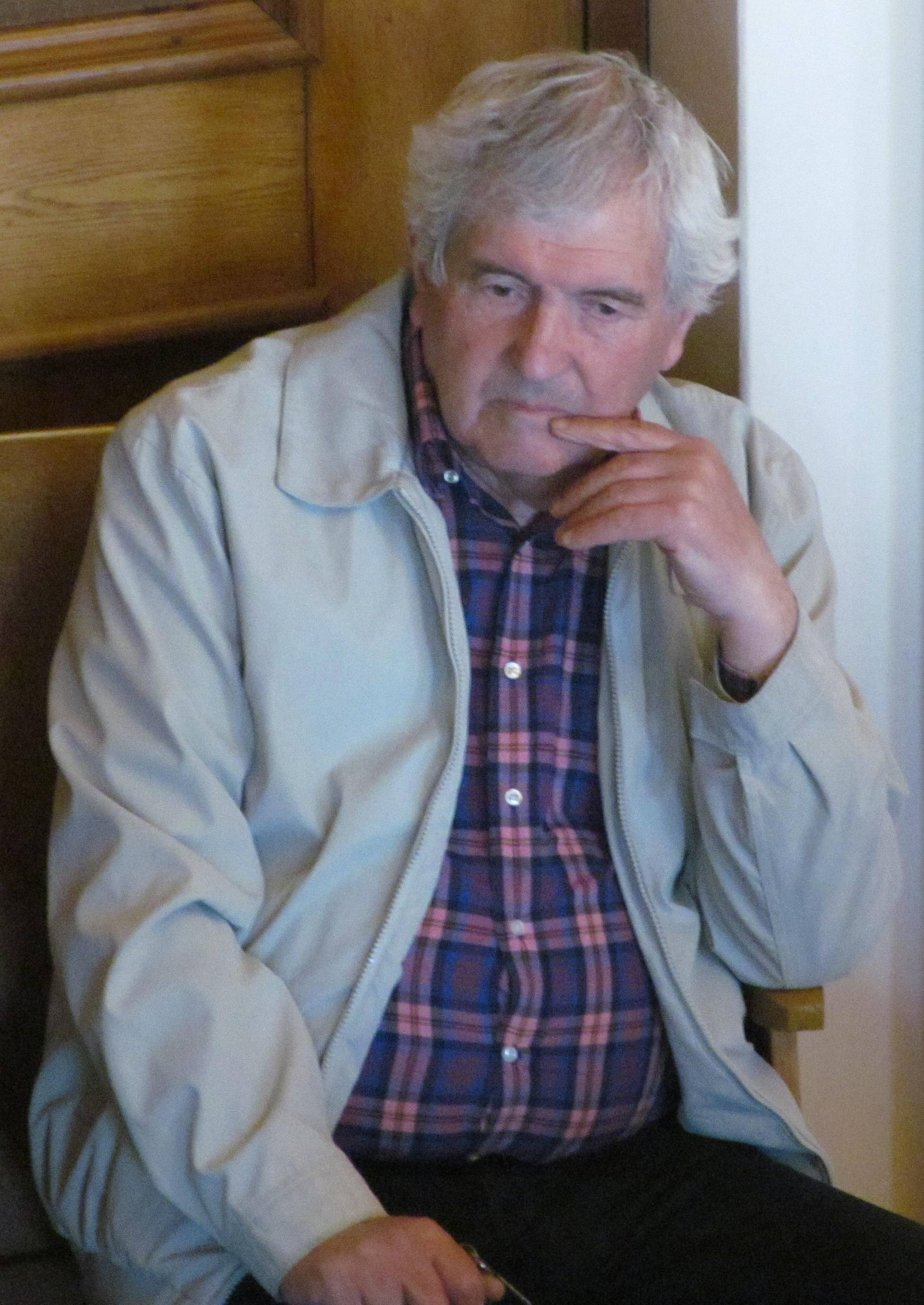 Фаготист Гаррий Артушевич Абаджян